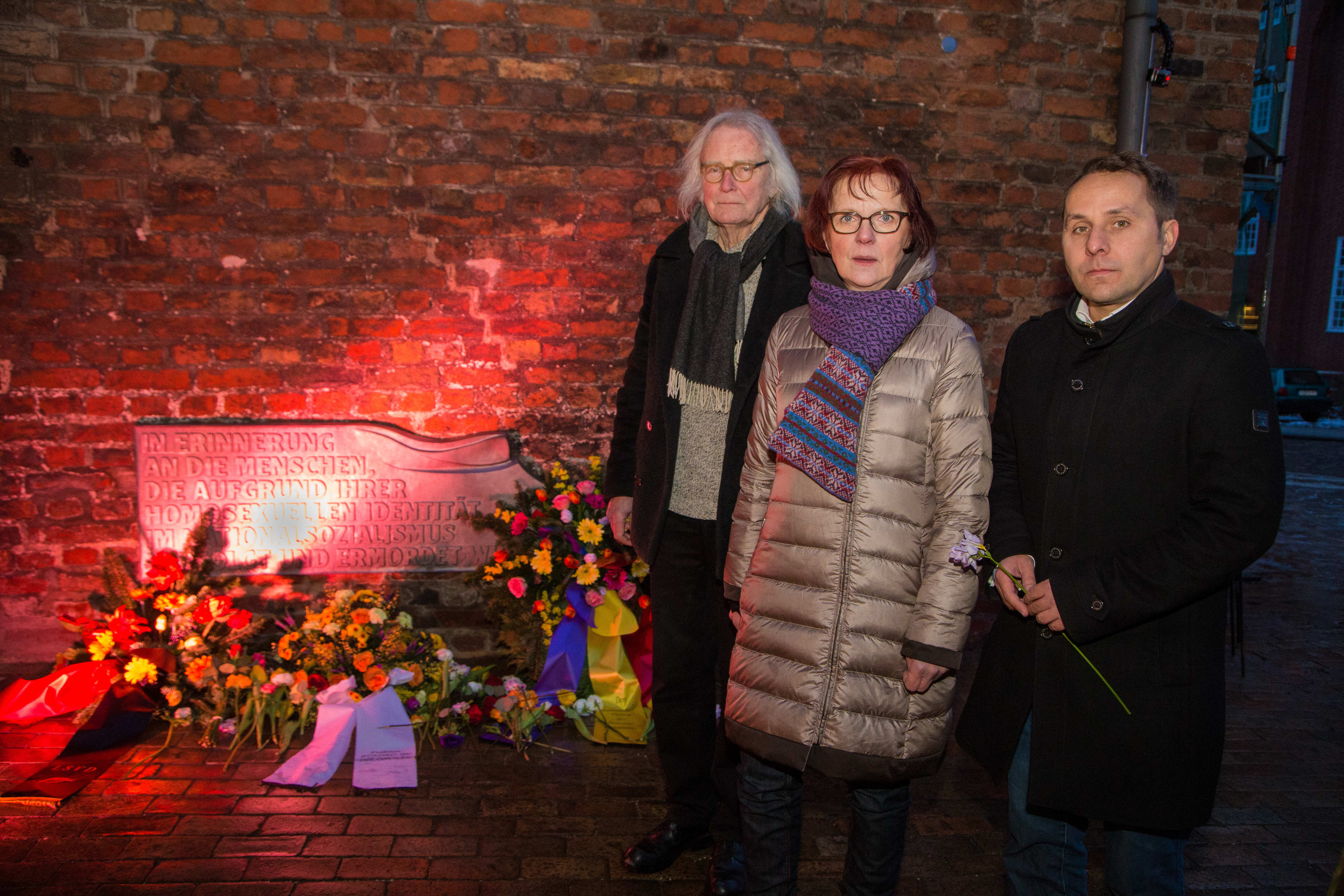 v.l.n.r. Künstler Erich Lethgau, Stadtpräsidentin Gabriele Schopenhauer, Vorsitzender des Lübecker CSD e.V. Christian Till